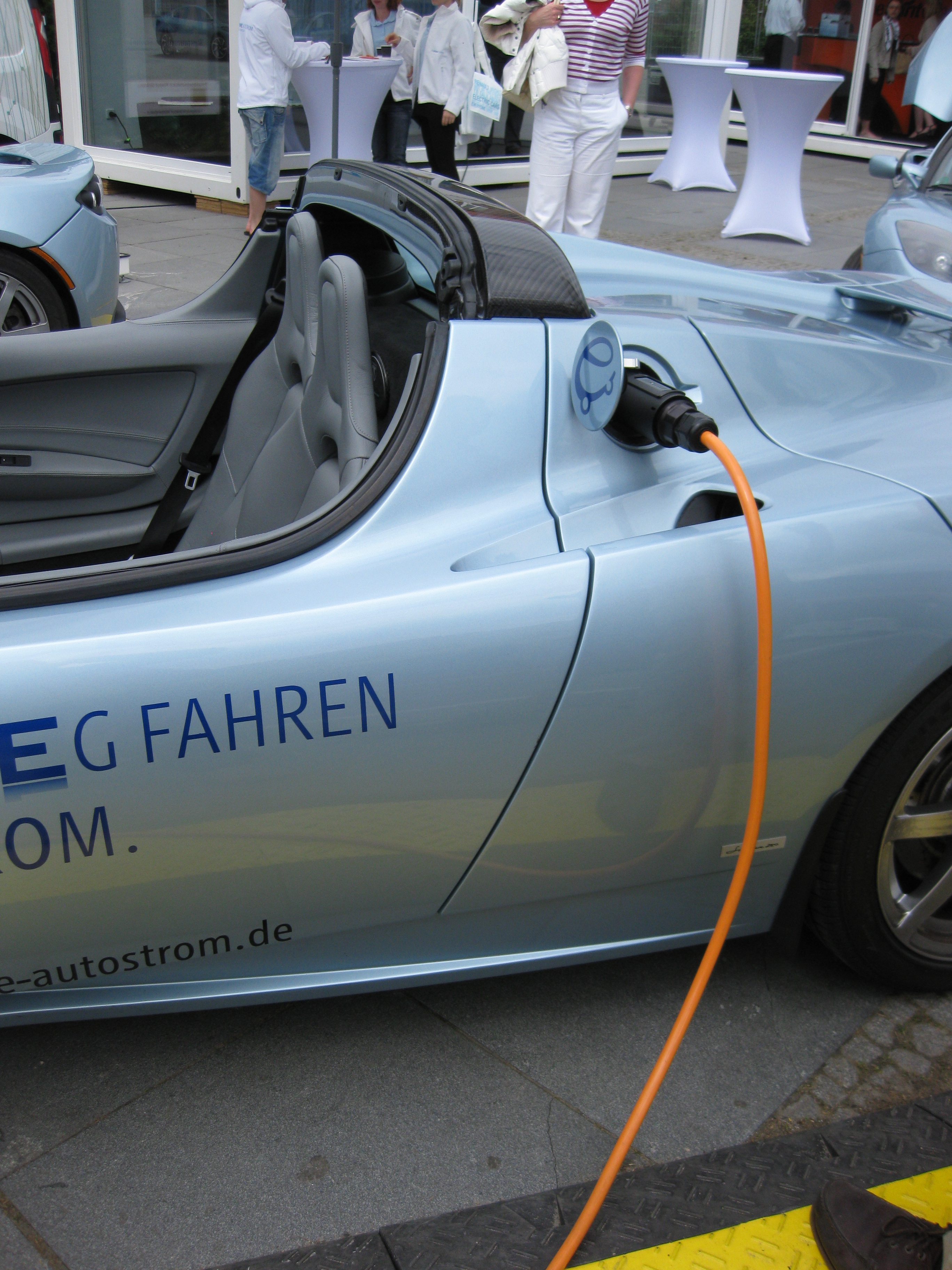 Tesla Roadster Ladevorgang